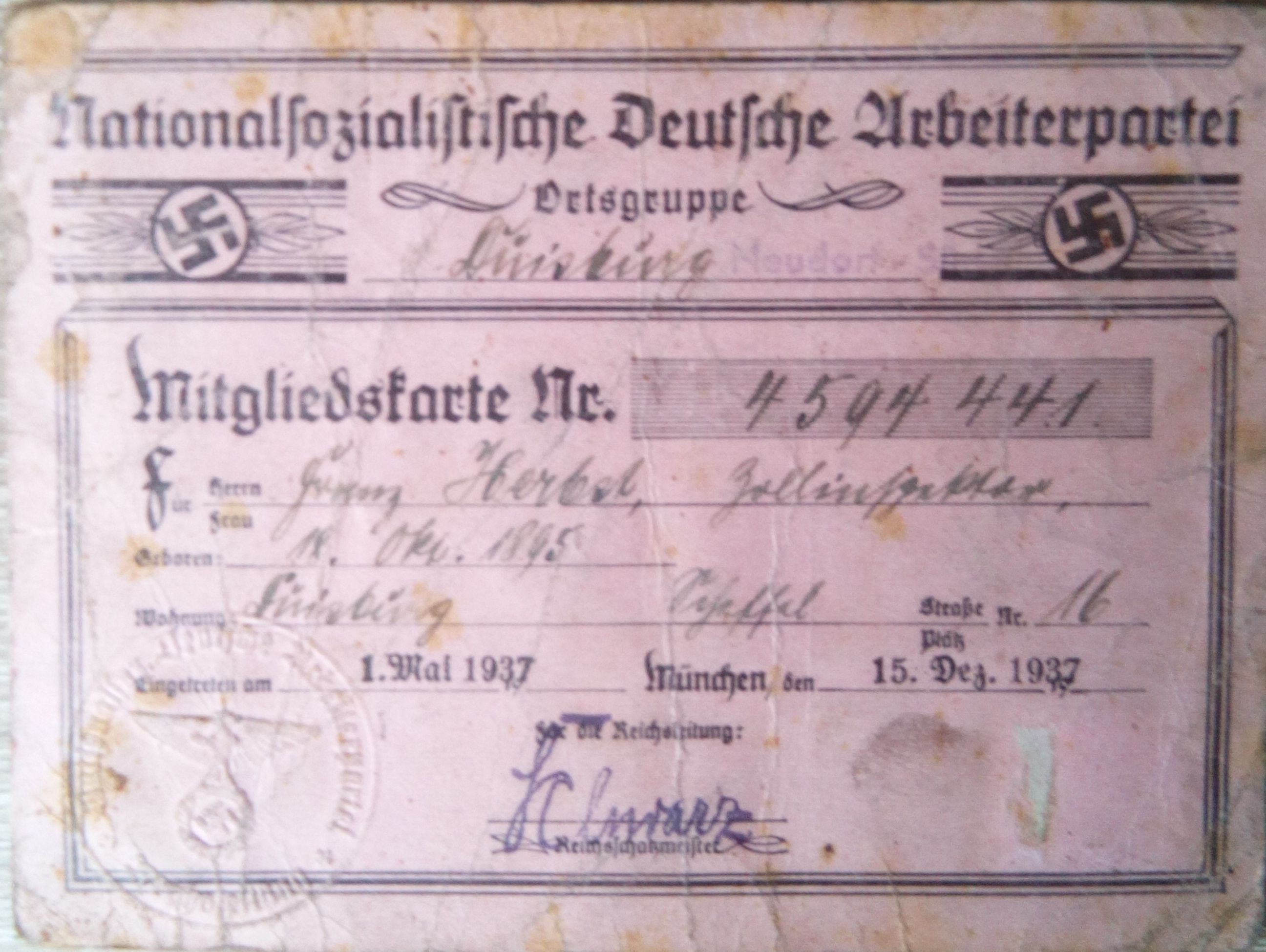 Mitgliedskarte der NSDAP von Franz Herbst (gefunden in Nachlass)